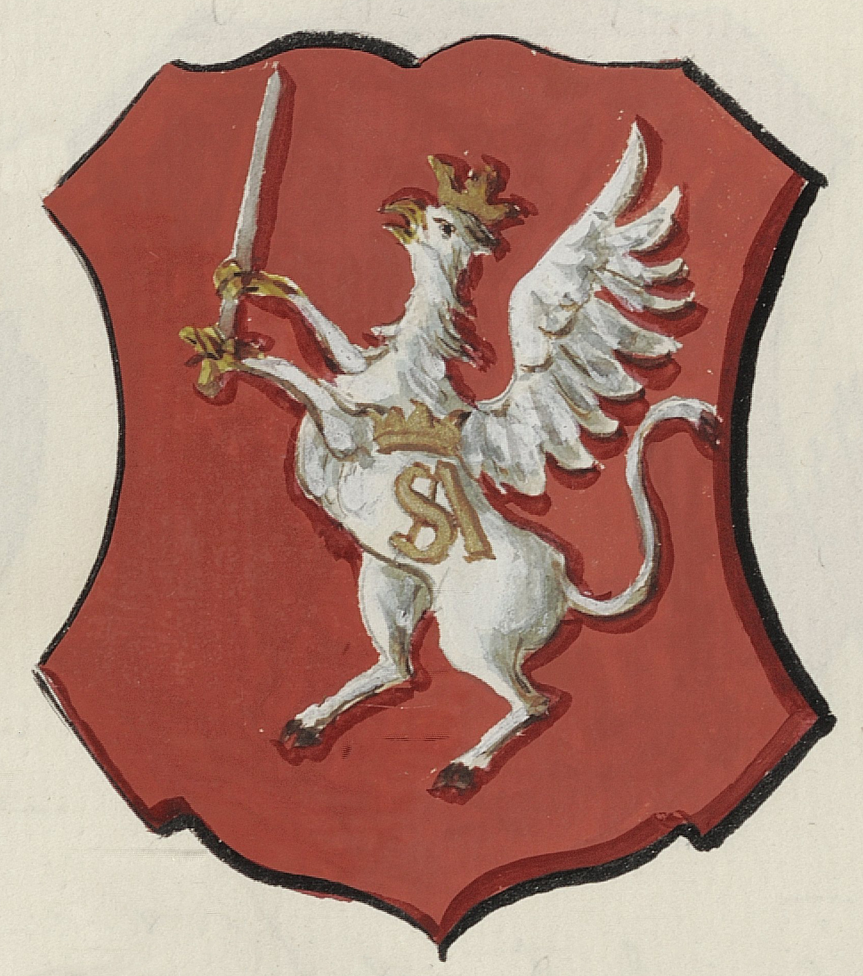 Беларуская (тарашкевіца): Герб Інфлянцкага ваяводзтва (Inflanty)